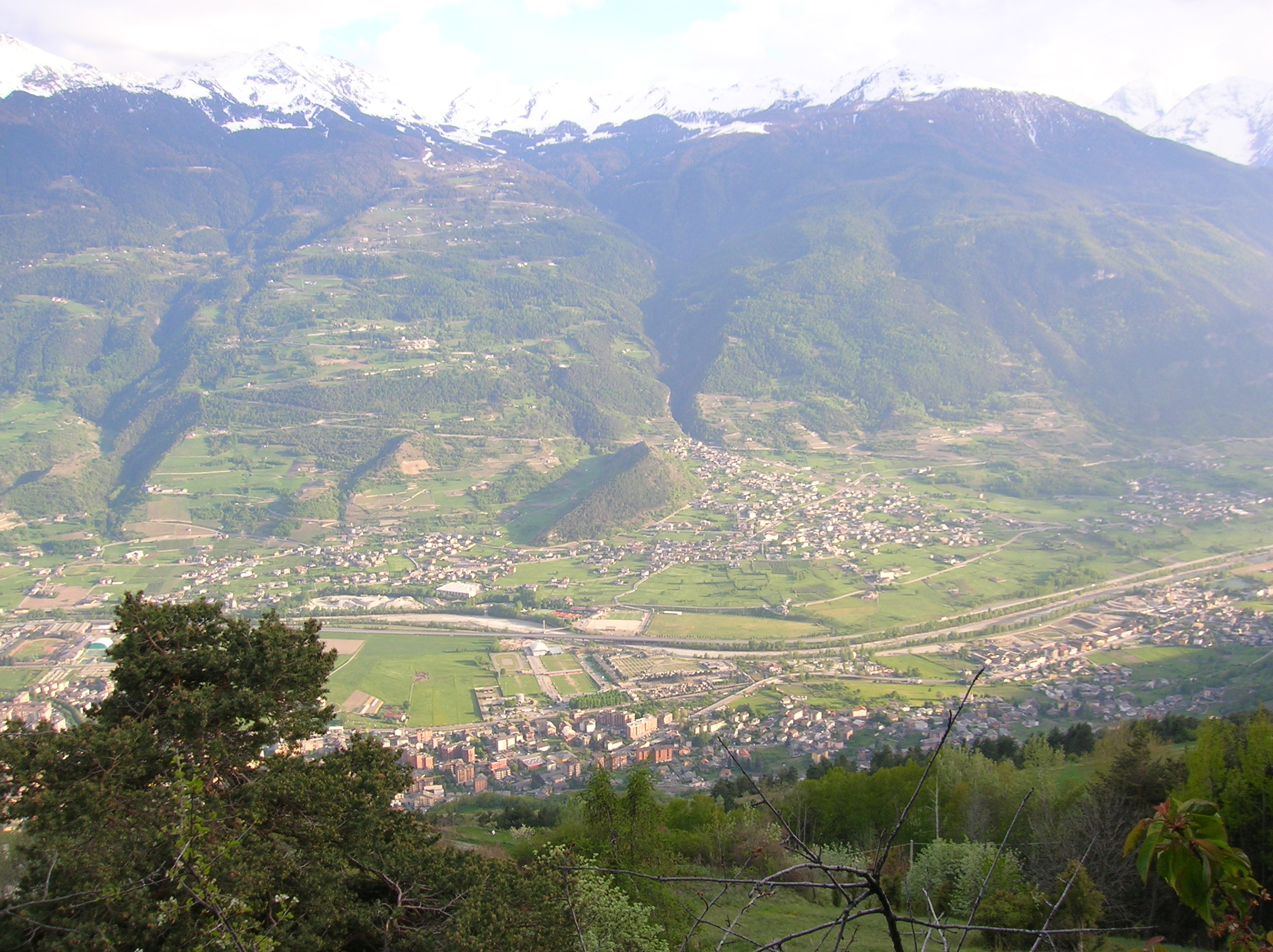 Panorama di Gressan e Riserva naturale Côte de Gargantua, Valle d'Aosta, Italia.